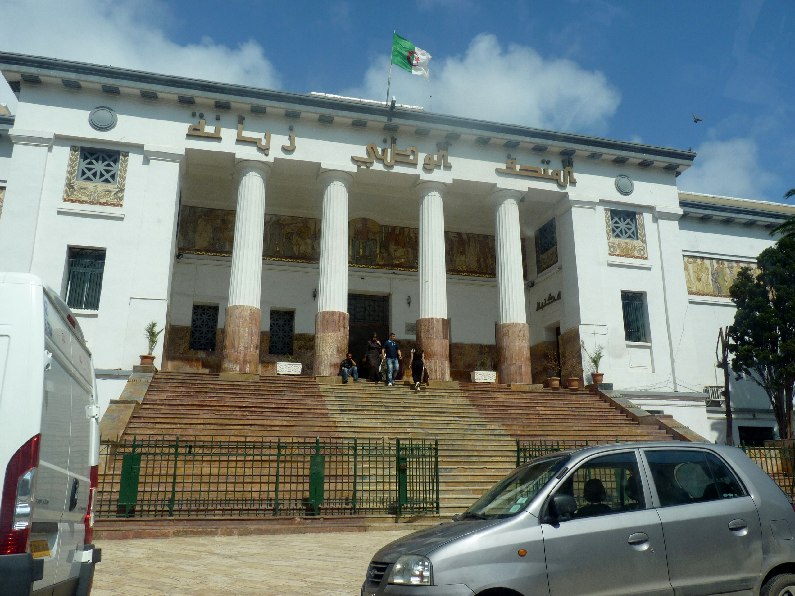 Das Nationalmuseum " Ahmed Zabana " von Oran 1 (ehemaliges Städtisches Museum von Oran dann Demaëght ) wurde 1885 2 von einer gelehrten Gesellschaft geschaffen, die zu dieser Zeit von der Gesellschaft für Geographie und Archäologie der Provinz Oran, Algerien